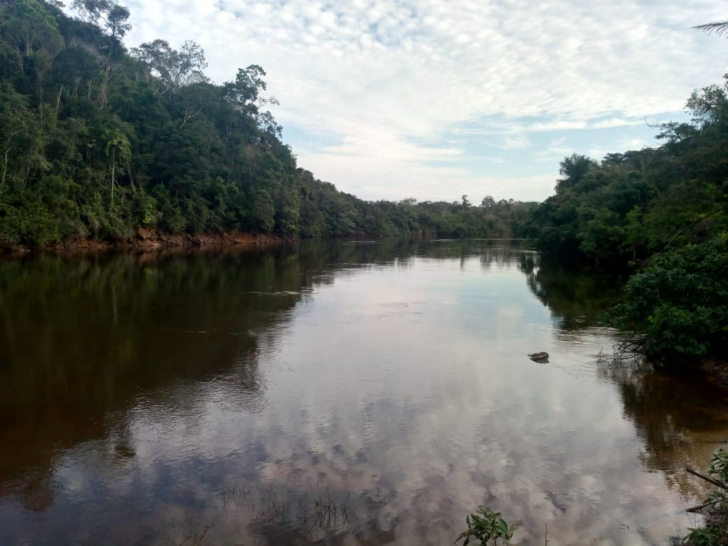 Rio Curuá-Una (Santarém/PA) Fotografado no Domingo, 15/07/2018